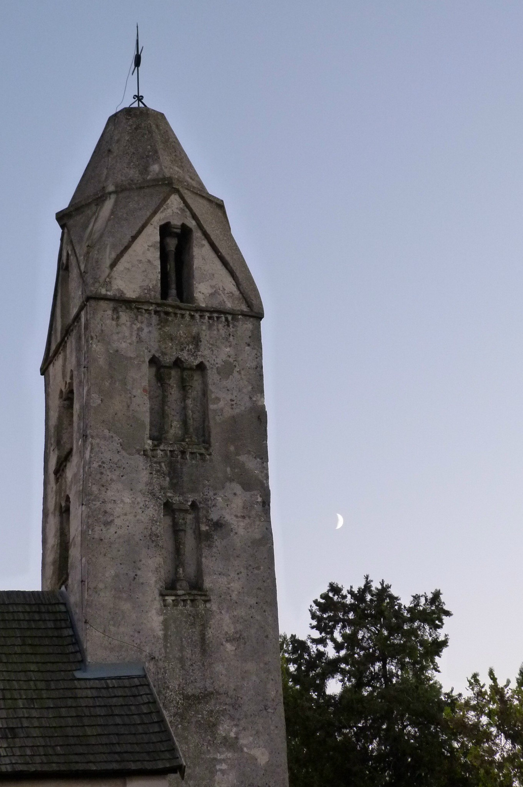 R. k. templom (Hévíz, EGREGY, Dombföldi u., temető)